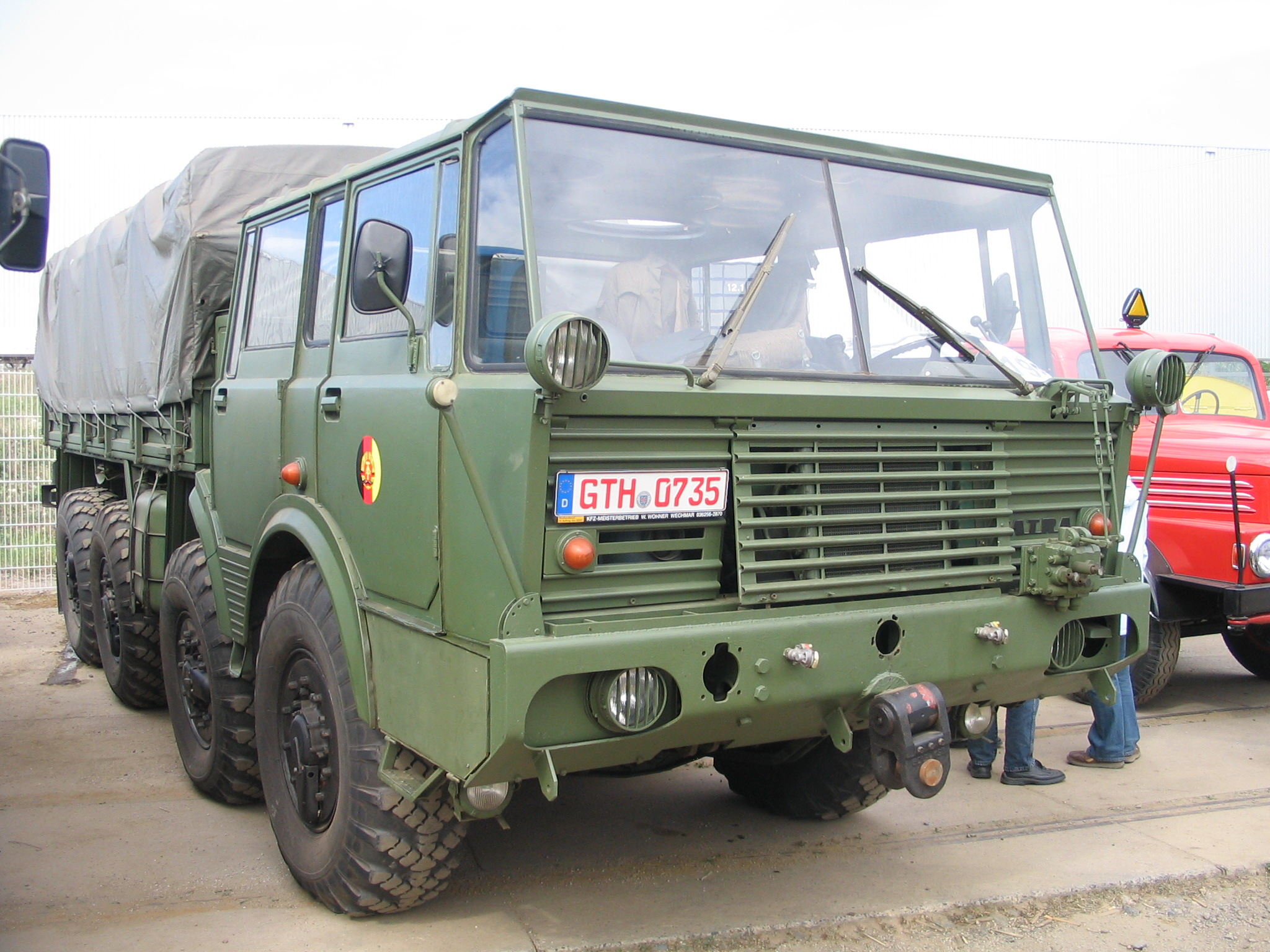 Tatra 813 8x8 Zugmaschine